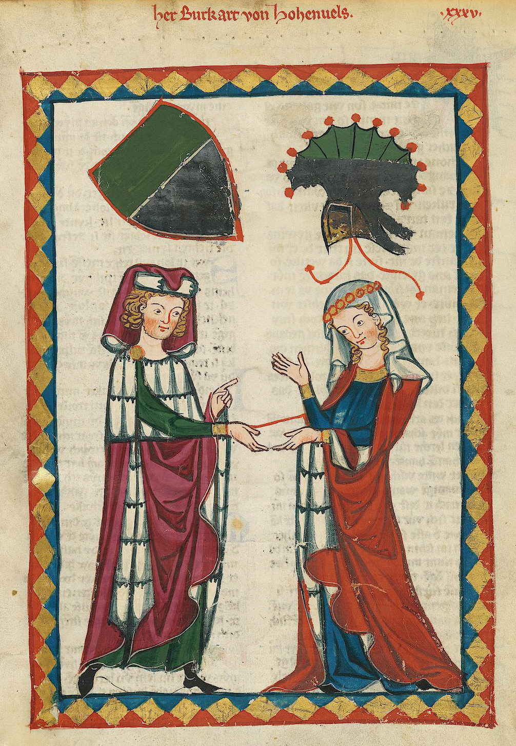 Codex Manesse, UB Heidelberg, Cod. Pal. germ. 848, fol. 110r: Birkart von Hohenfels